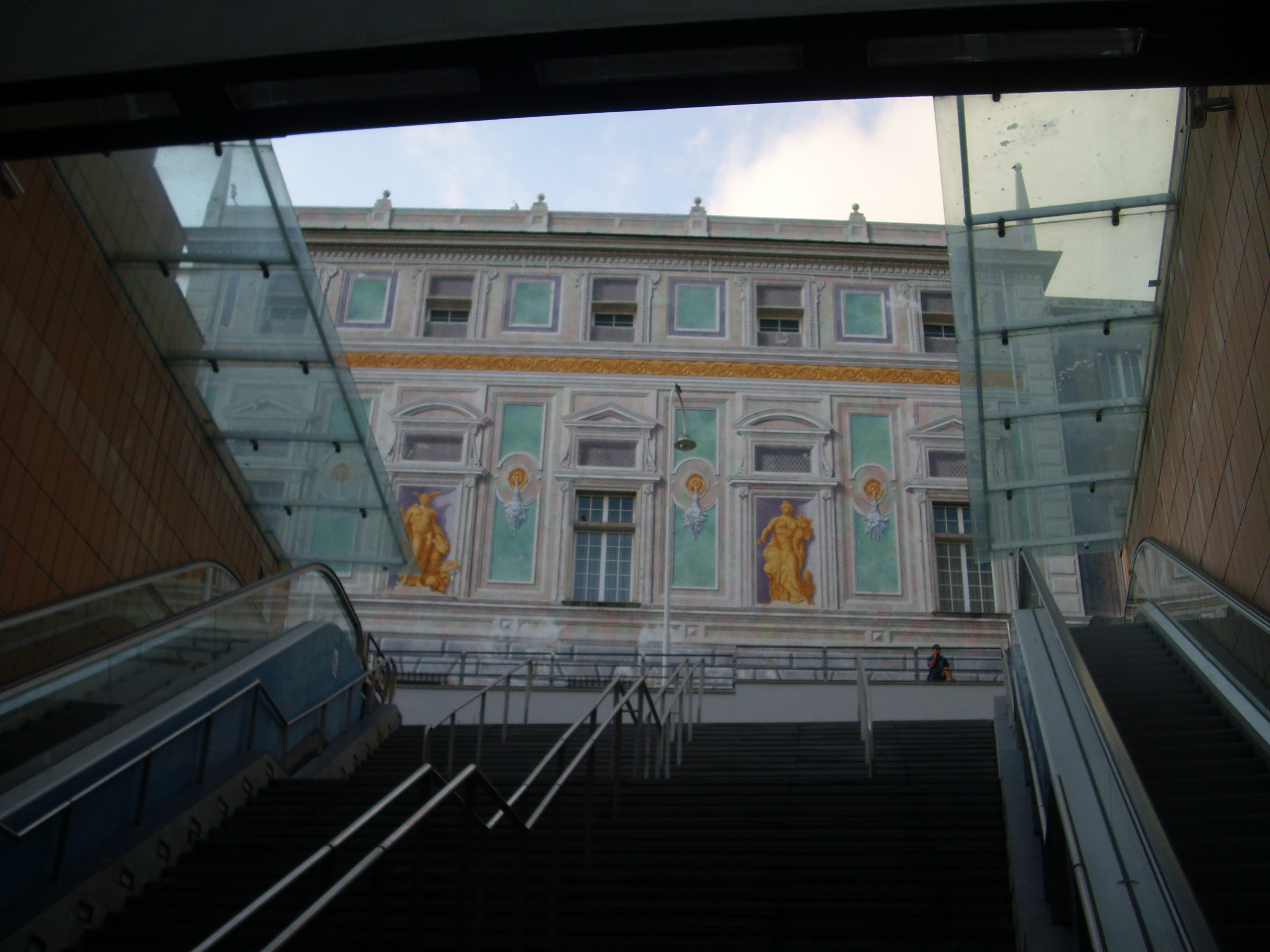 Palazzo San Giorgio a Genova, fotografato dalla stazione della metropolitana di Caricamento/San Giorgio